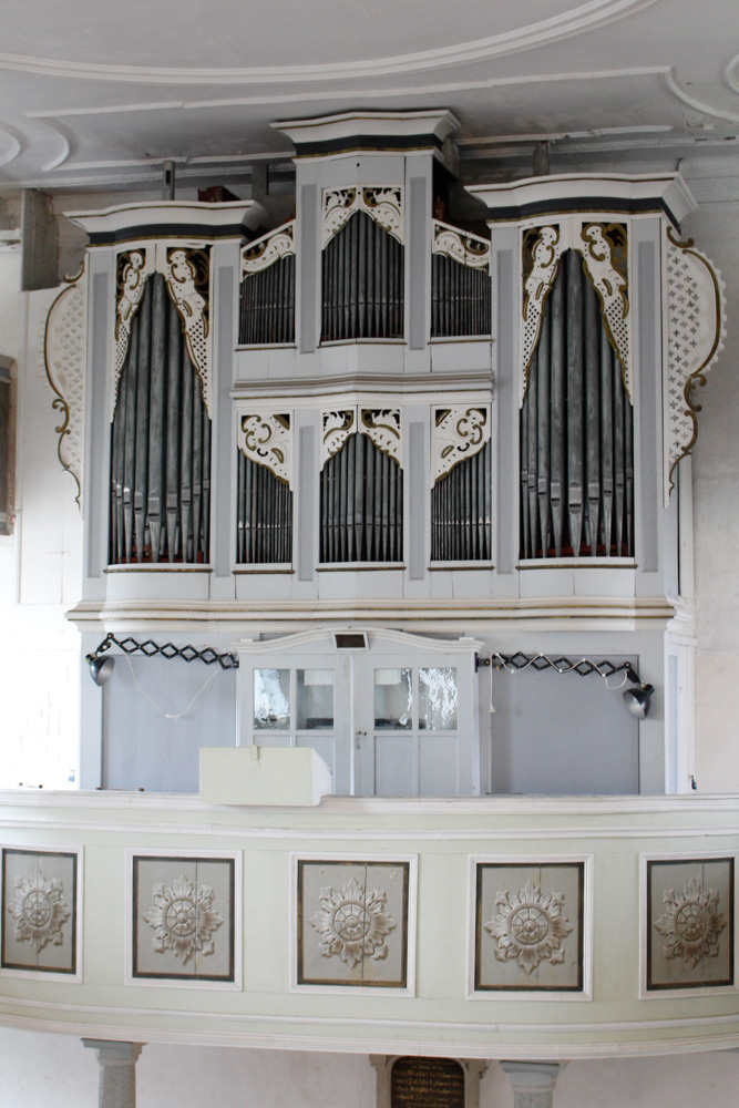 Kirche in Kayna, Zeitz, Burgenlandkreis, Sachsen-Anhalt, Deutschland